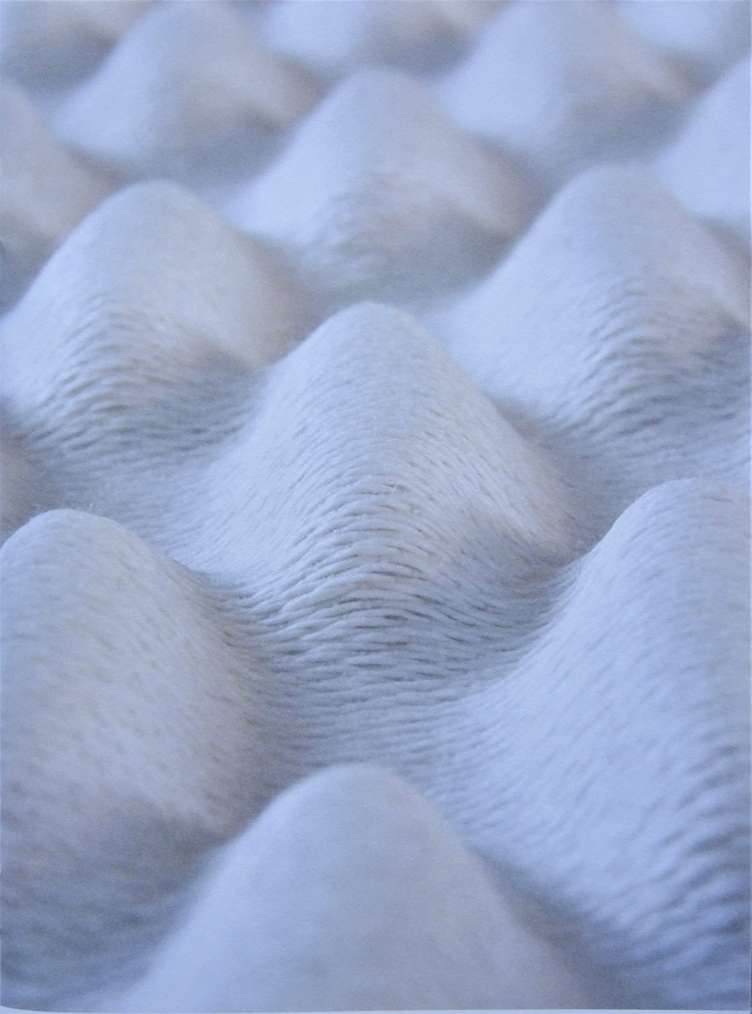 3D-weefsel ONDO voor akoestische wanddecoratie (foto: reproductie uit Aleksandra Gaca productenbrochure met toestemming van Aleksandra Gaca).